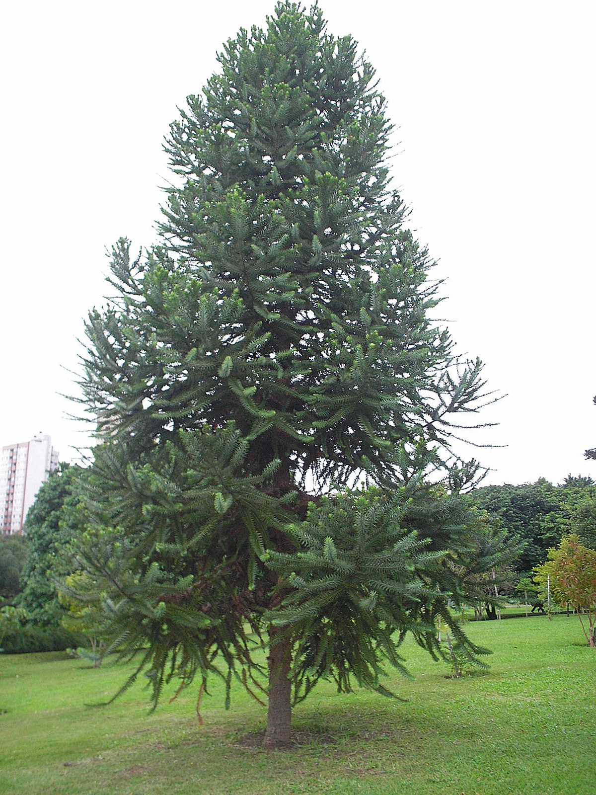 Jovem Pinheiro-do-Paraná/Araucária (Araucaria Angustifolia) no Jardim Botânico de Curitiba